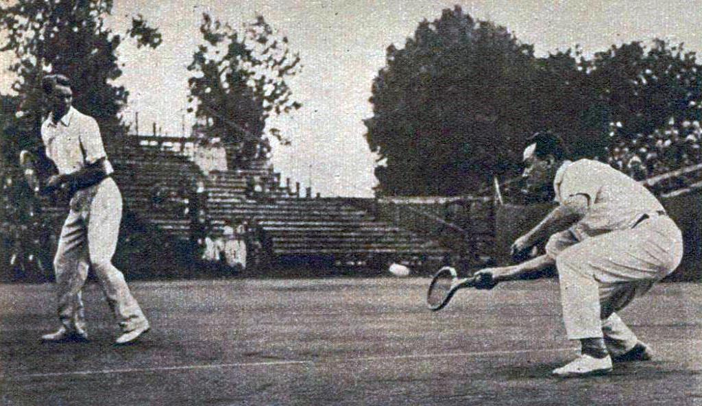 Vincent Richards (G.) et Francis Hunter (D.), vainqueurs du double messieurs aux JO de 1924.